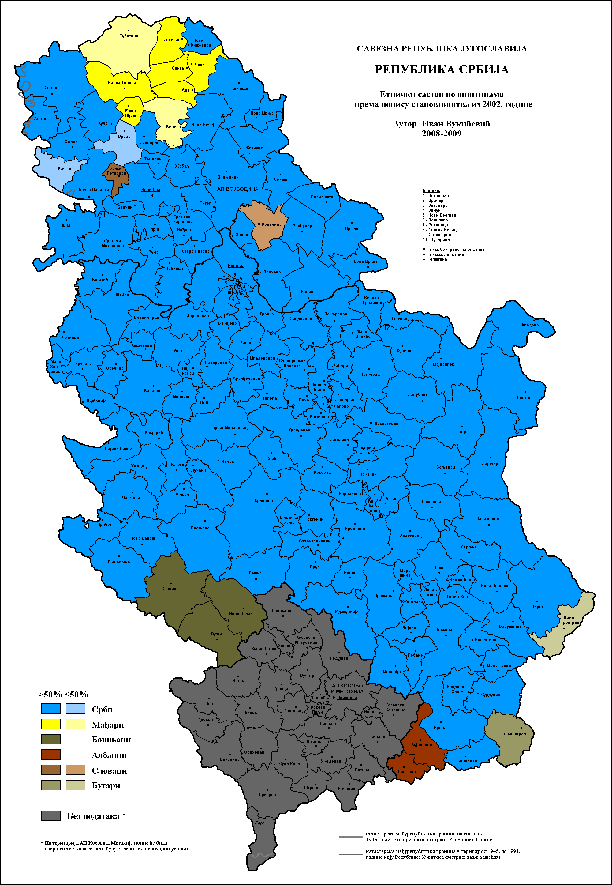 Етнички састав Србије по општинама 2002. године. Аутор: Иван Вукићевић